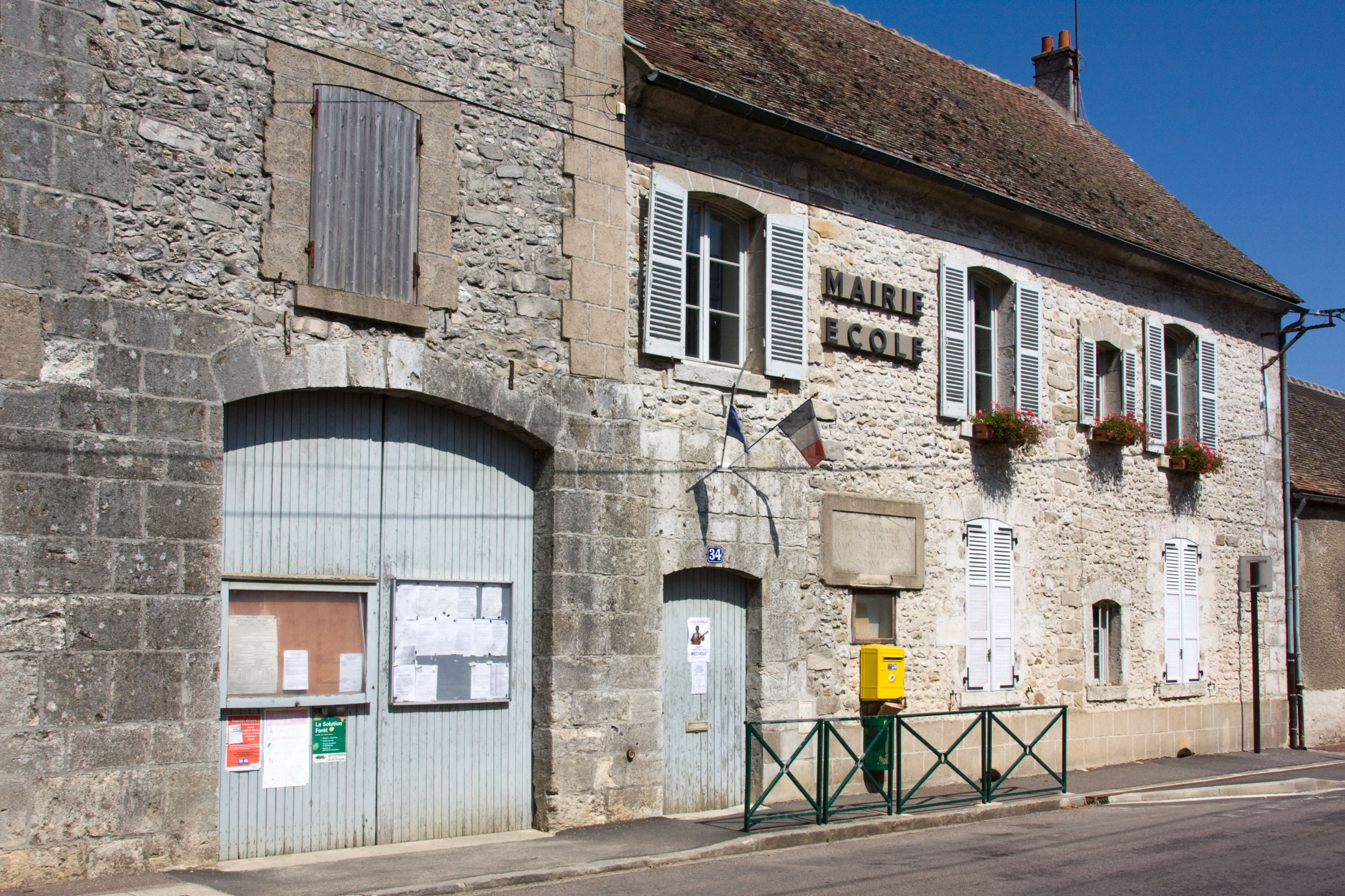 La mairie de Tousson, Tousson, Seine-et-Marne, France